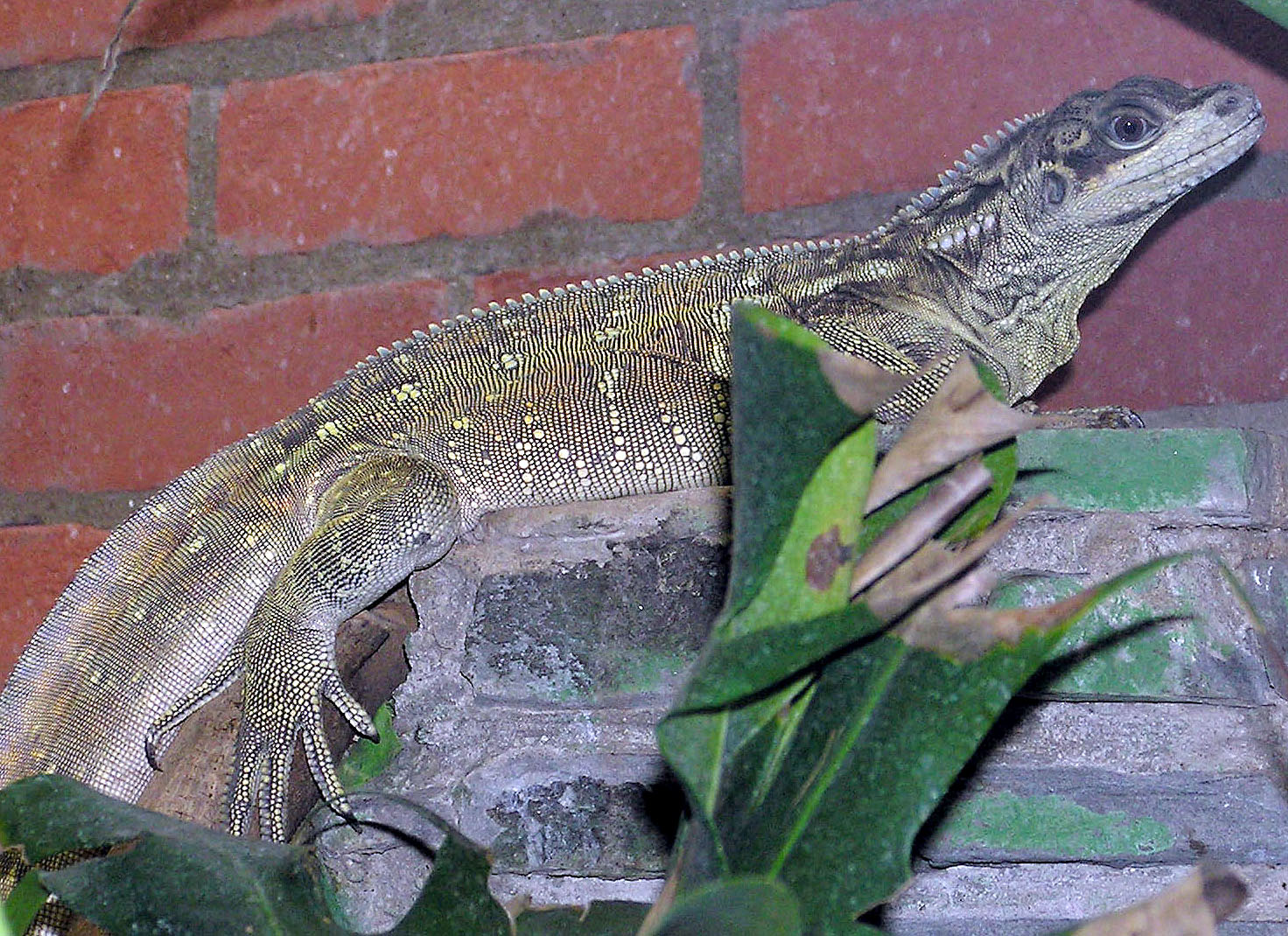 Philippines sailfin lizard Hydrosaurus pustulatus at Bristol Zoo, Bristol, England.